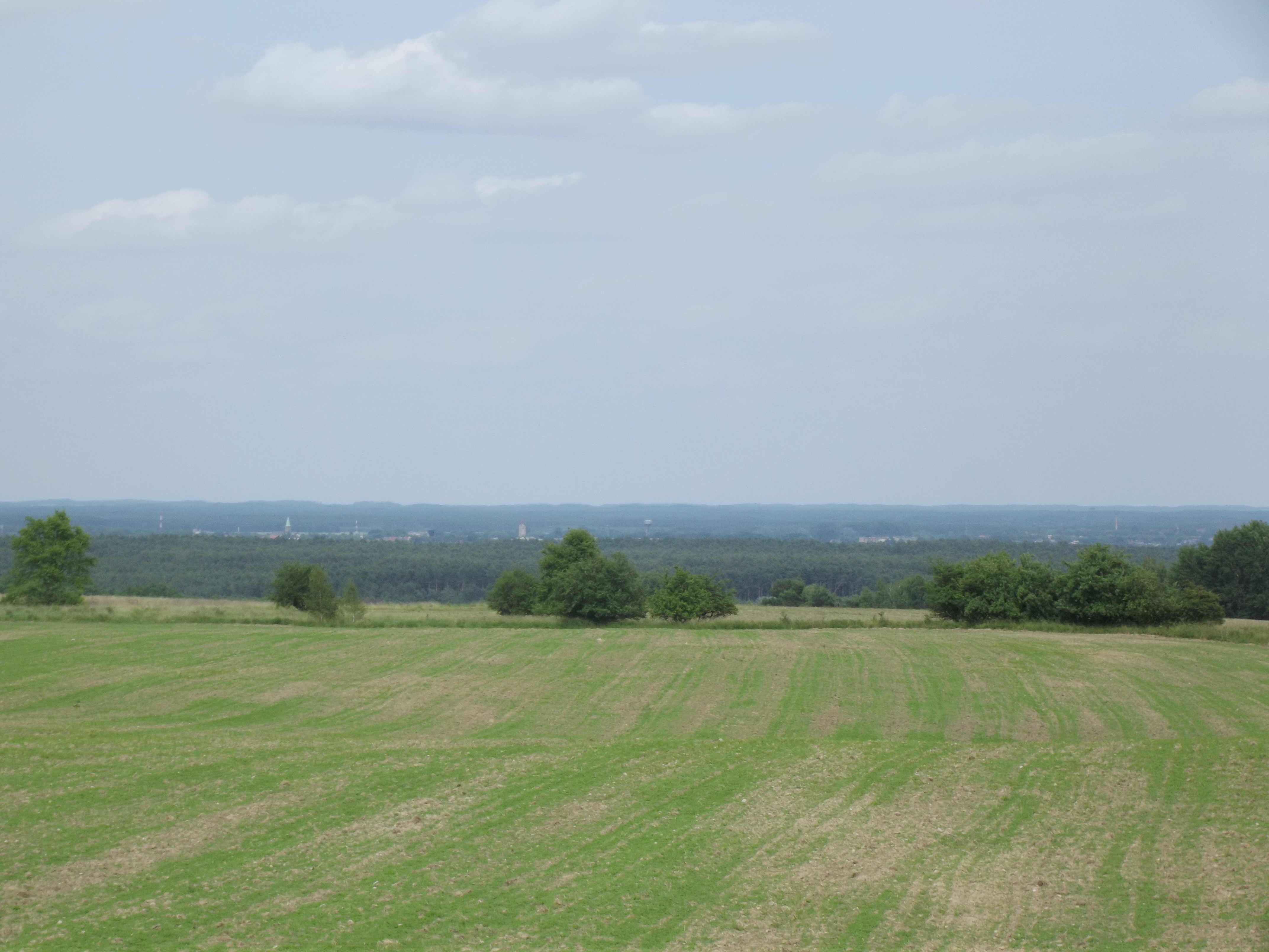 Najwyższe wzniesienie w G. Międzyrzecz, wys. 137. metrów n.p.m., okolice Nietoperka, widok na Międzyrzecz